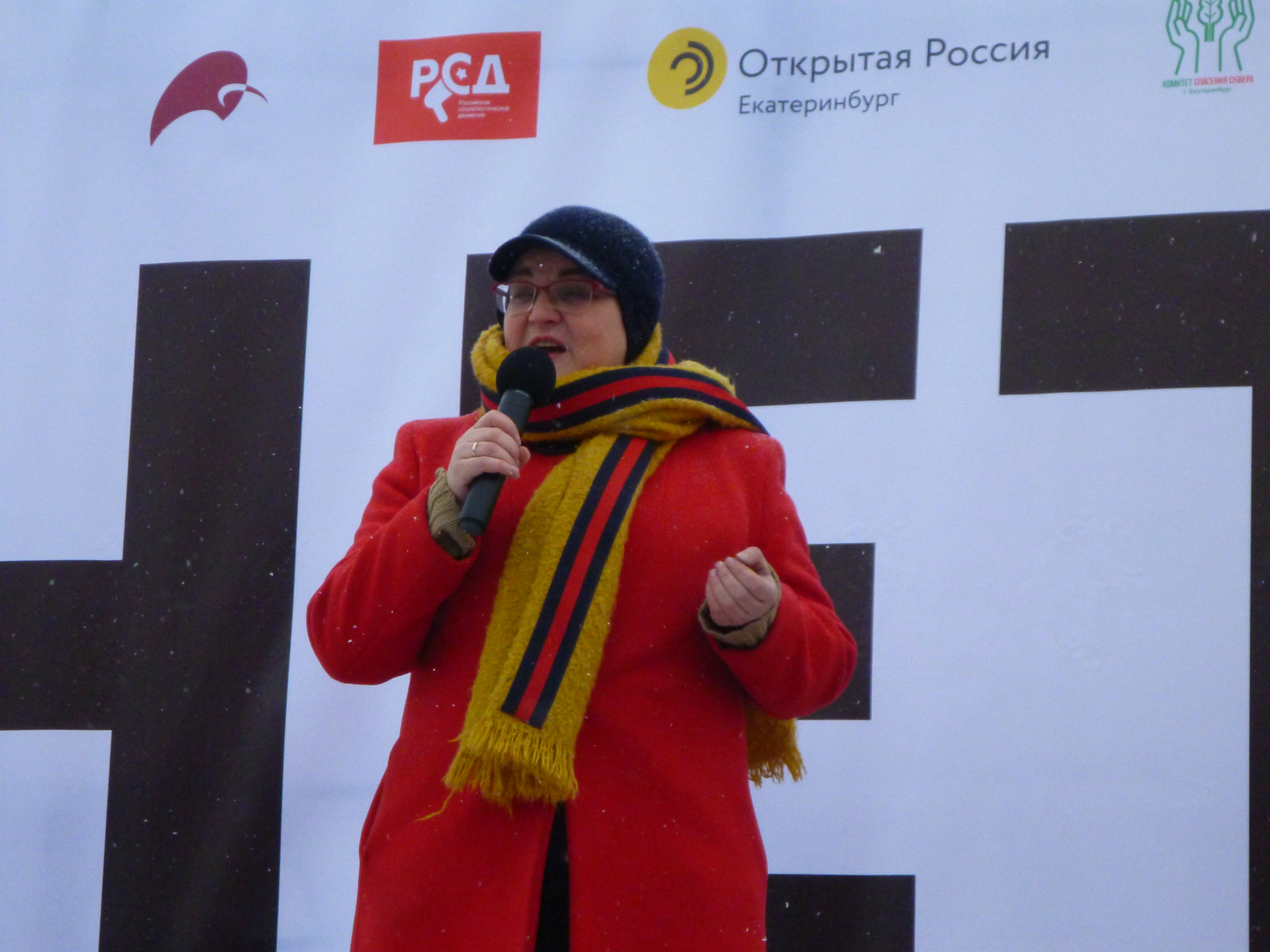 Юлия Евгеньевна Галямина на митинге 1 февраля 2020 года в Екатеринбурге